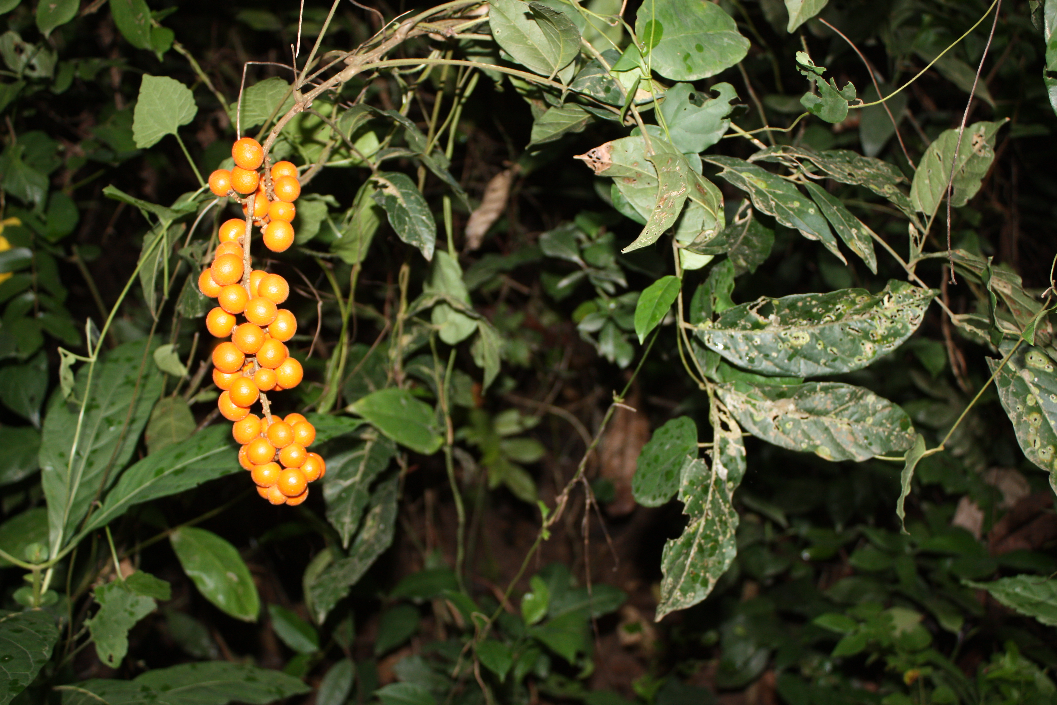 fruits of Deinbollia pinnata, F.Cl. de Pahou, Benin